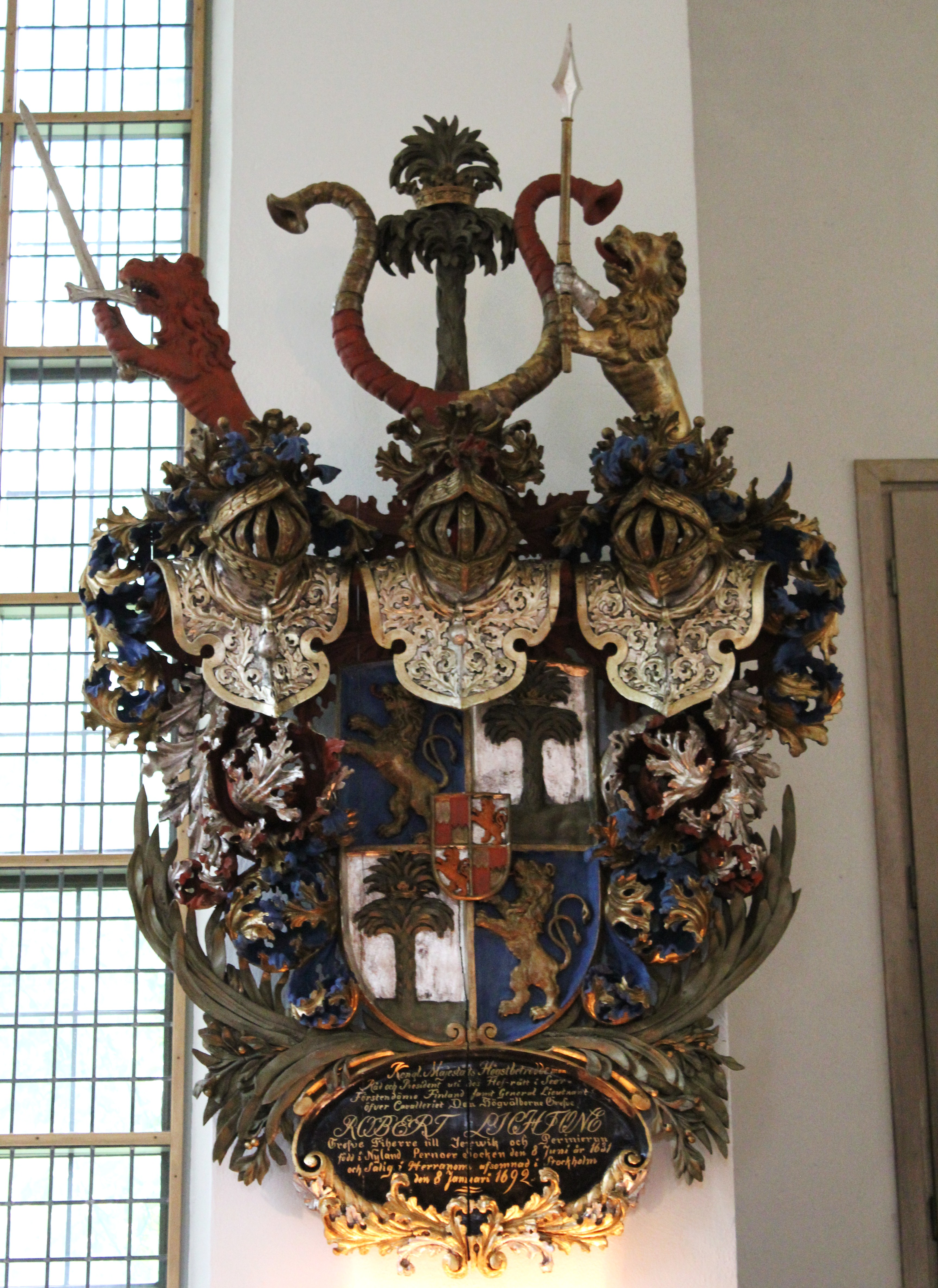 Kungsholms kyrka. Robert Lichtones begravningsvapen.